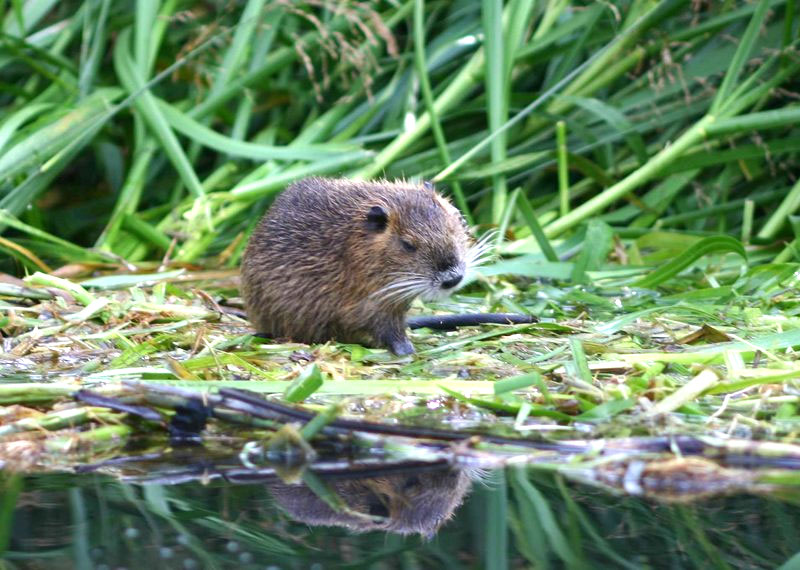 Myocastor coypus (Biberratte) in Lehde, Spreewald (Germany)